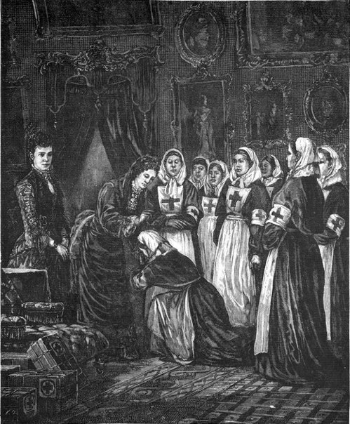 Императрица Мария Александровна благославляет сестёр милосердия, отправляющихся на войну в 1877 г. История царствования императора Александра II в картинах СПб.: Тип. Т-ва «Общественная польза», 1882., 102 с.